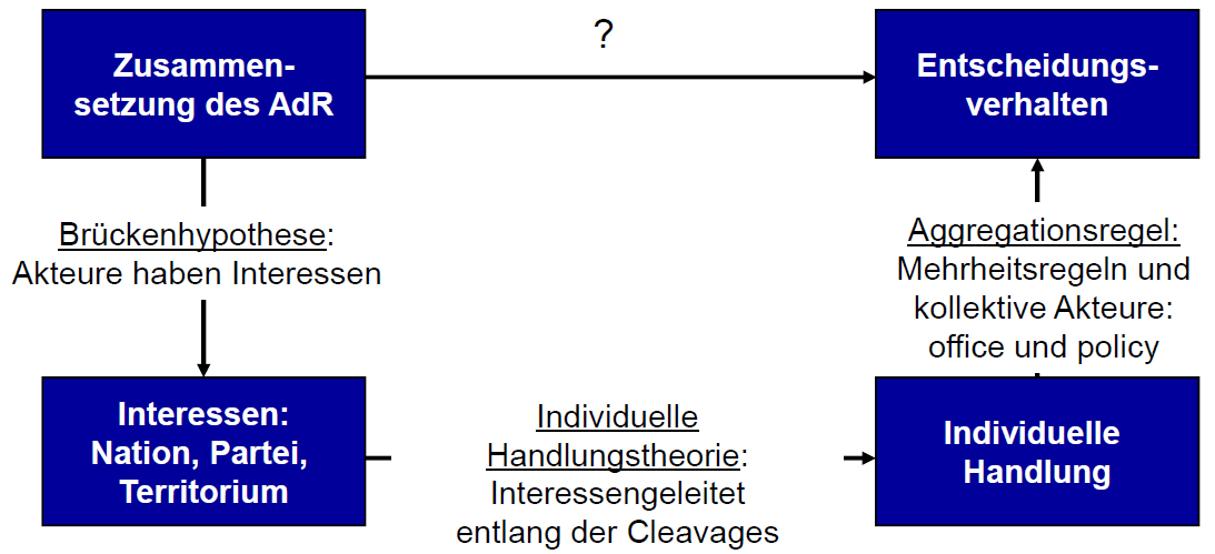 Beispiel des Makro-Mikro-Makro-Ansatzes (James Samuel Coleman); "Colemansche Badewanne".